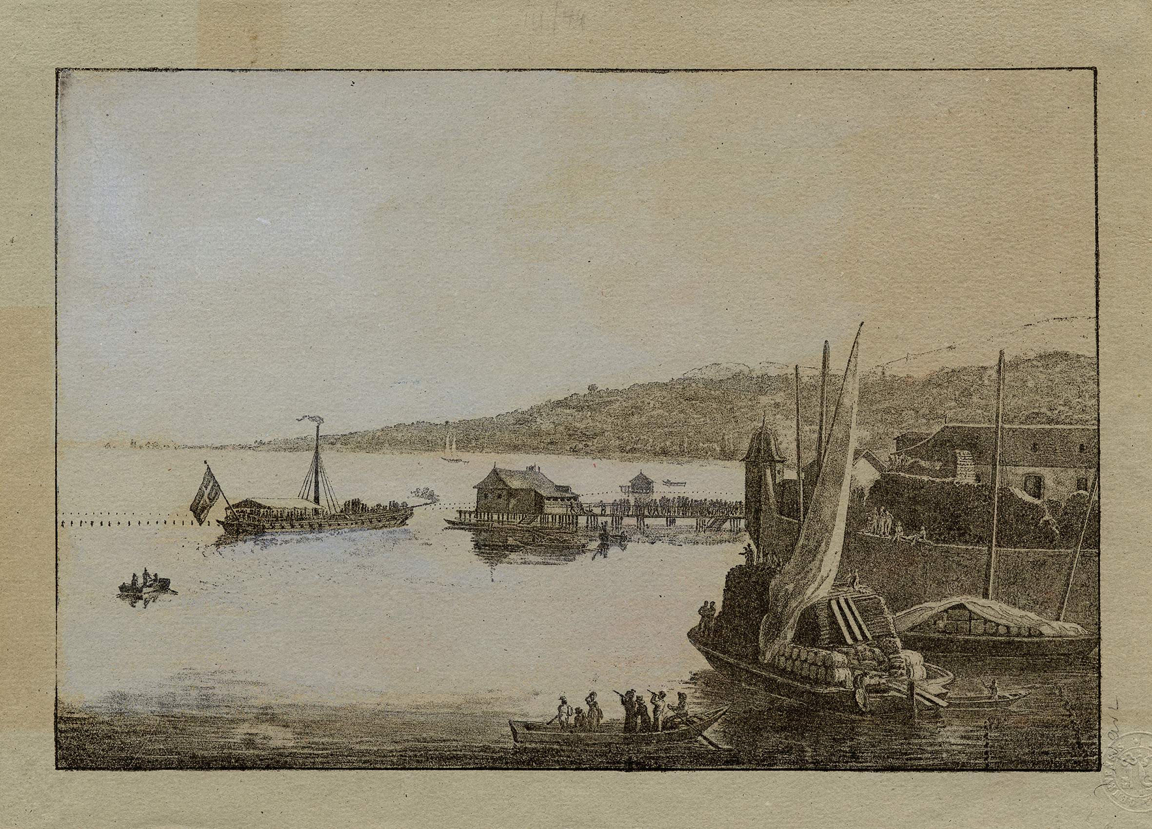 Gravure (lithographie) de 1825 montrant le Guillaume Tell quittant le port de Genève, vue de trois quarts arrière. Collection Bibliothèque de Genève.